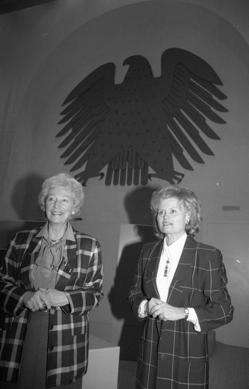 29.10.1986 Hannelore Kohl, die Frau des Bundeskanzlers, besichtigt gemeinsam mit den Gattinnen der Bundesminister und der Regierungssprecher das zum provisorischen Plenarsaal des Deutschen Bundestages umgebaute Wasserwerk am Rheinufer. Die Führung hat die Vizepräsidentin des Bundestages, Annemarie Renger übernommen.